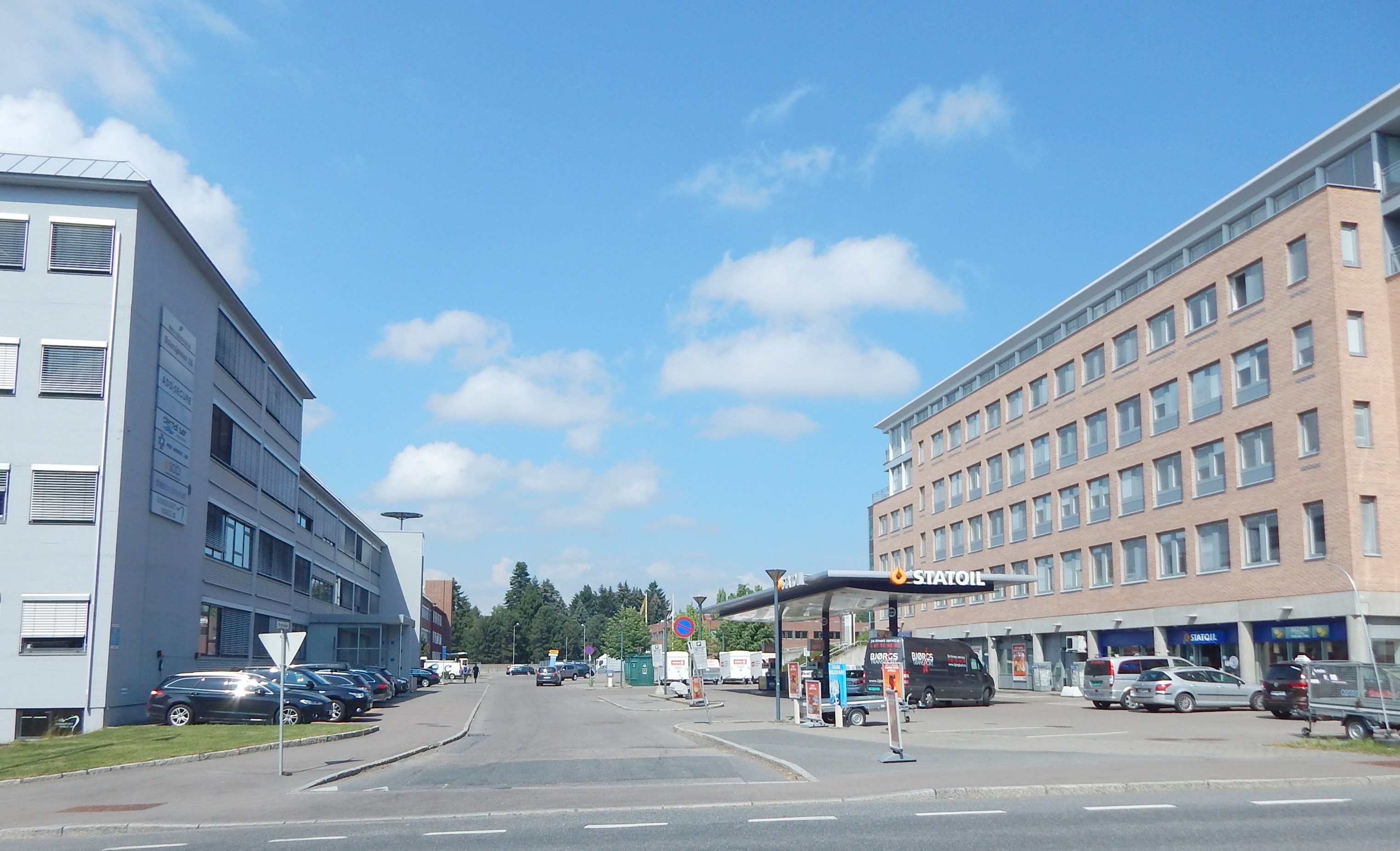 Brynsveien sett fra Østensjøveien